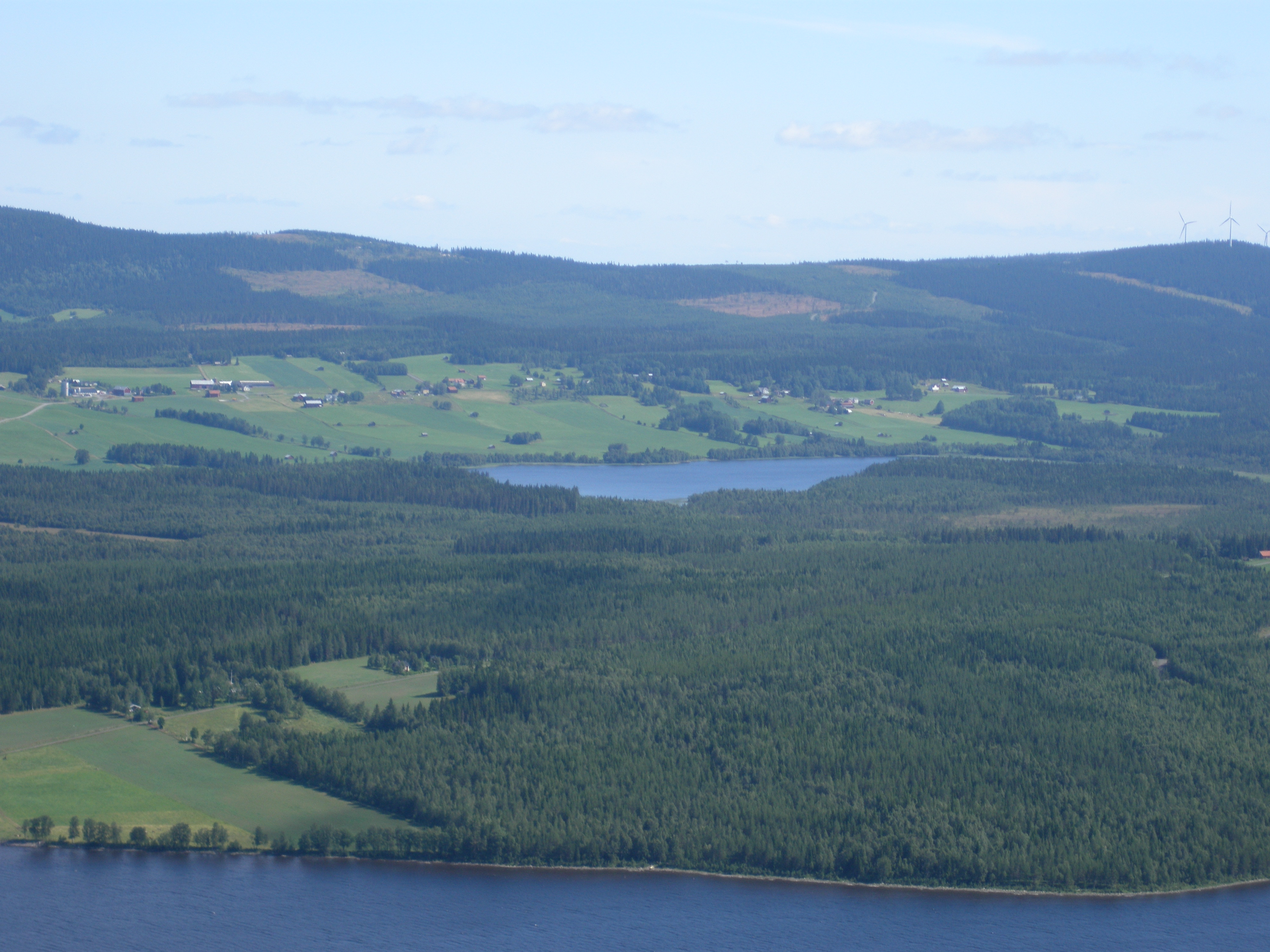 Utsikt från Hällbergt mot Mussjön, Offerdals socken, Krokoms kommun, Jämtland, Sverige.